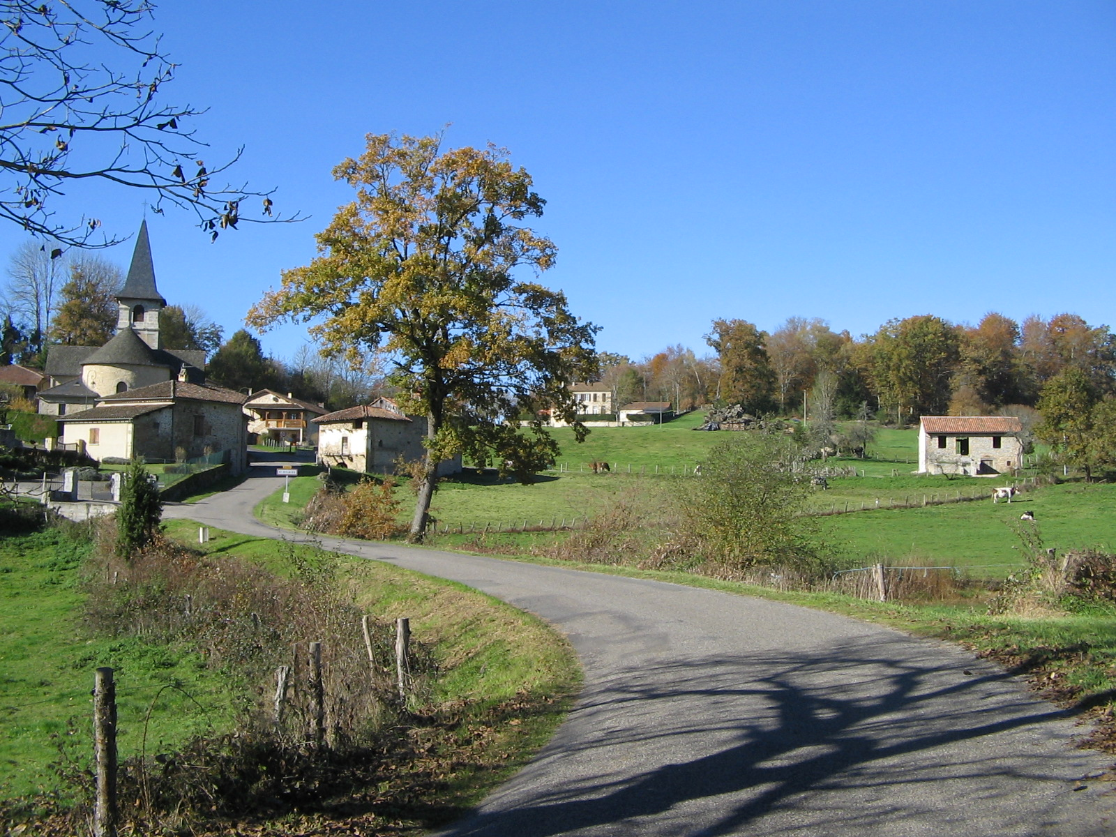 le village de siant-hilaire dans le lot en novembre 2012